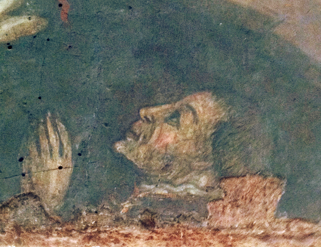 Dettaglio del donatore.